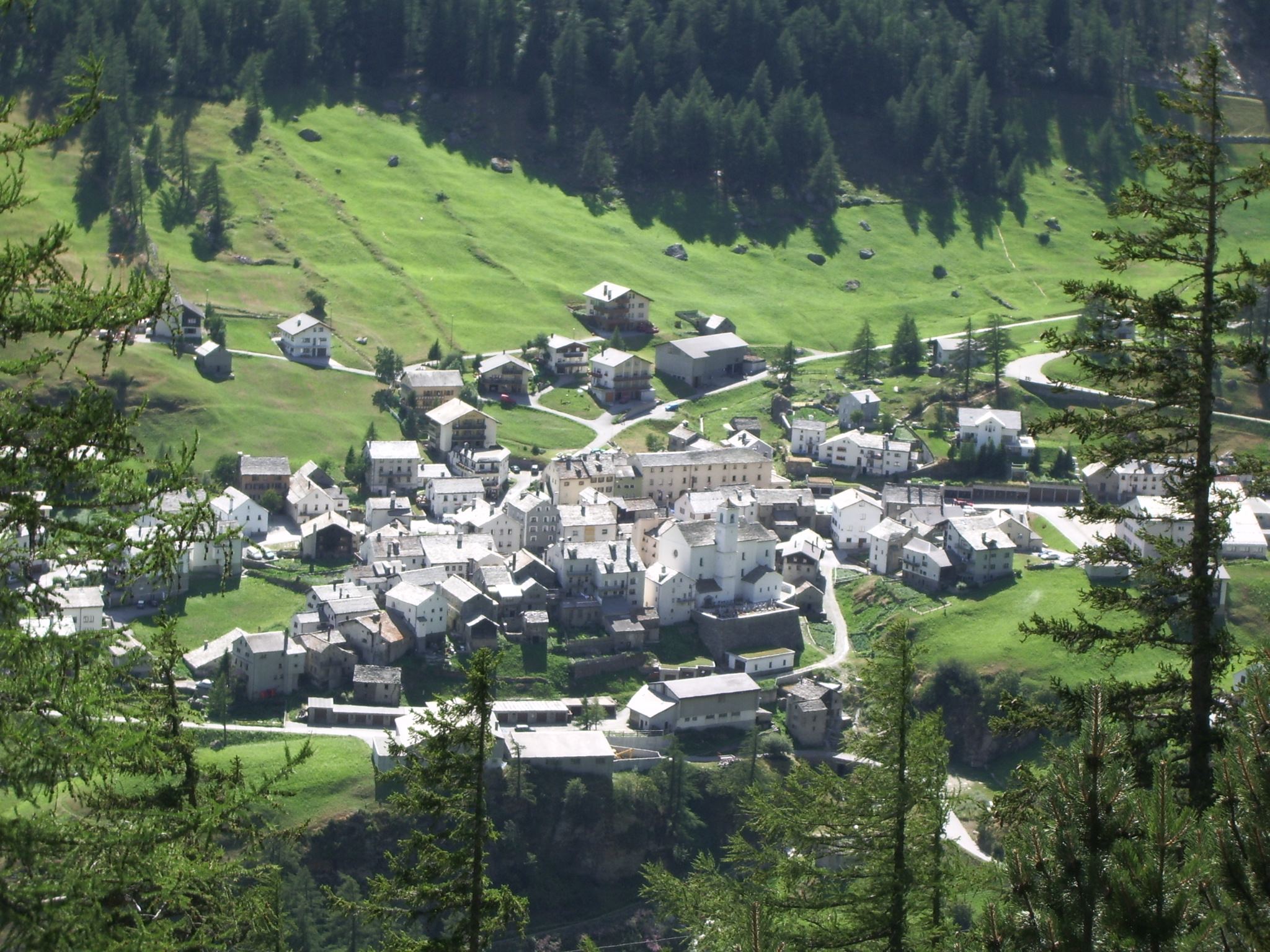 Blick auf Simplon Dorf. Foto selbst erstellt im Sommer 2006.